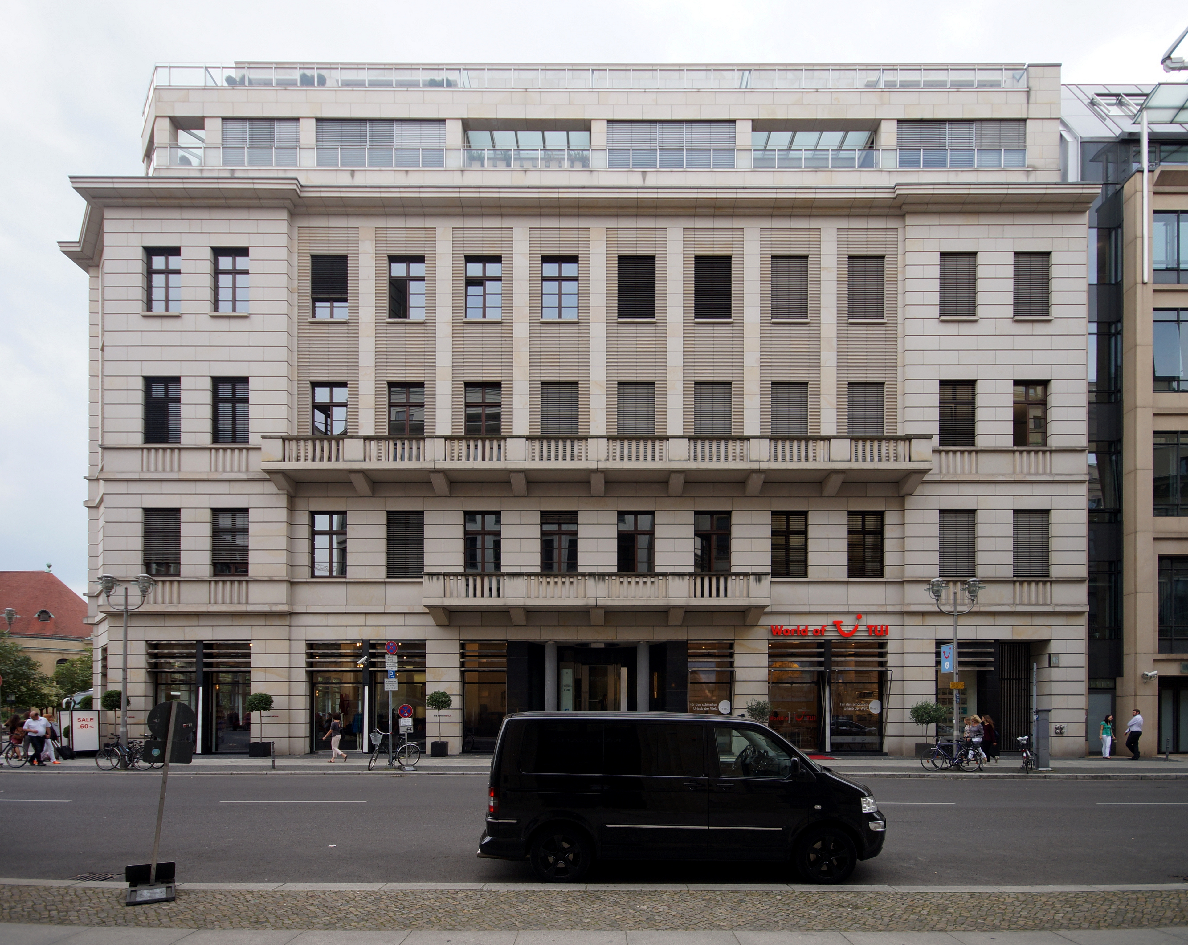 Die Fassade des denkmalgeschützten Hauses in der Markgrafenstraße 46 in Berlin-Mitte